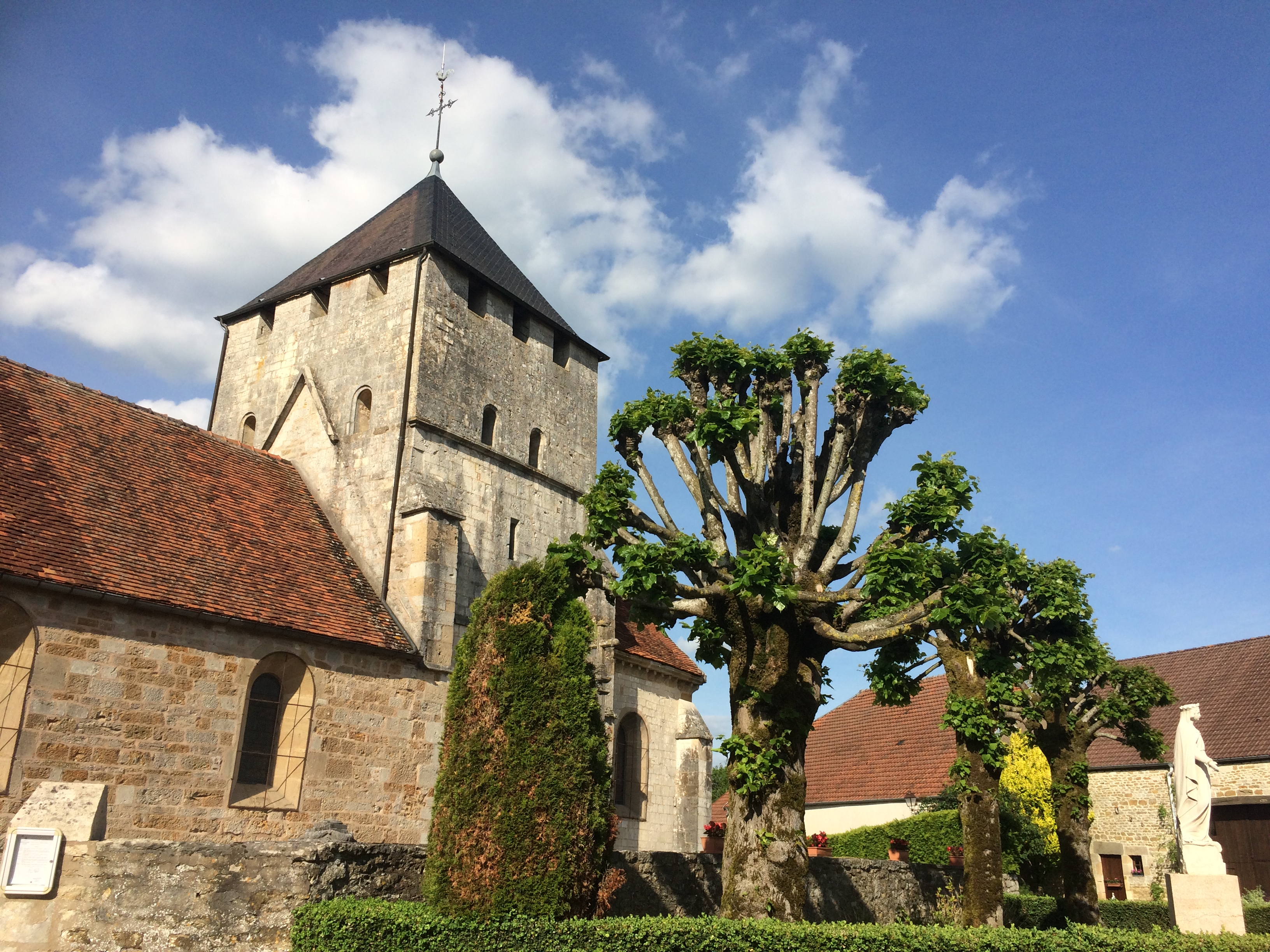 Eglise Saint-Sébastien de Champigny-lès-Langres.